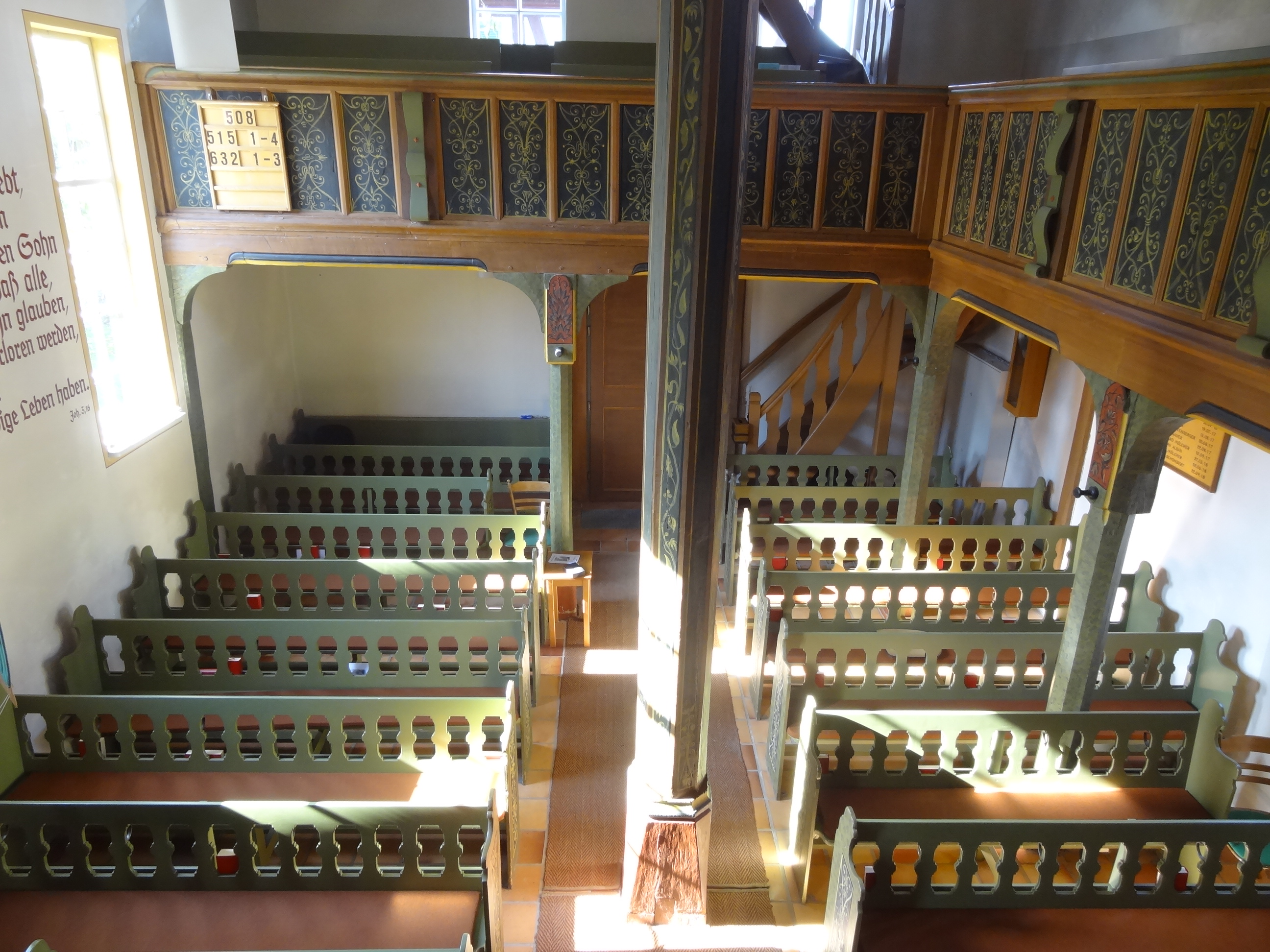 Evangelische Kirche Lardenbach